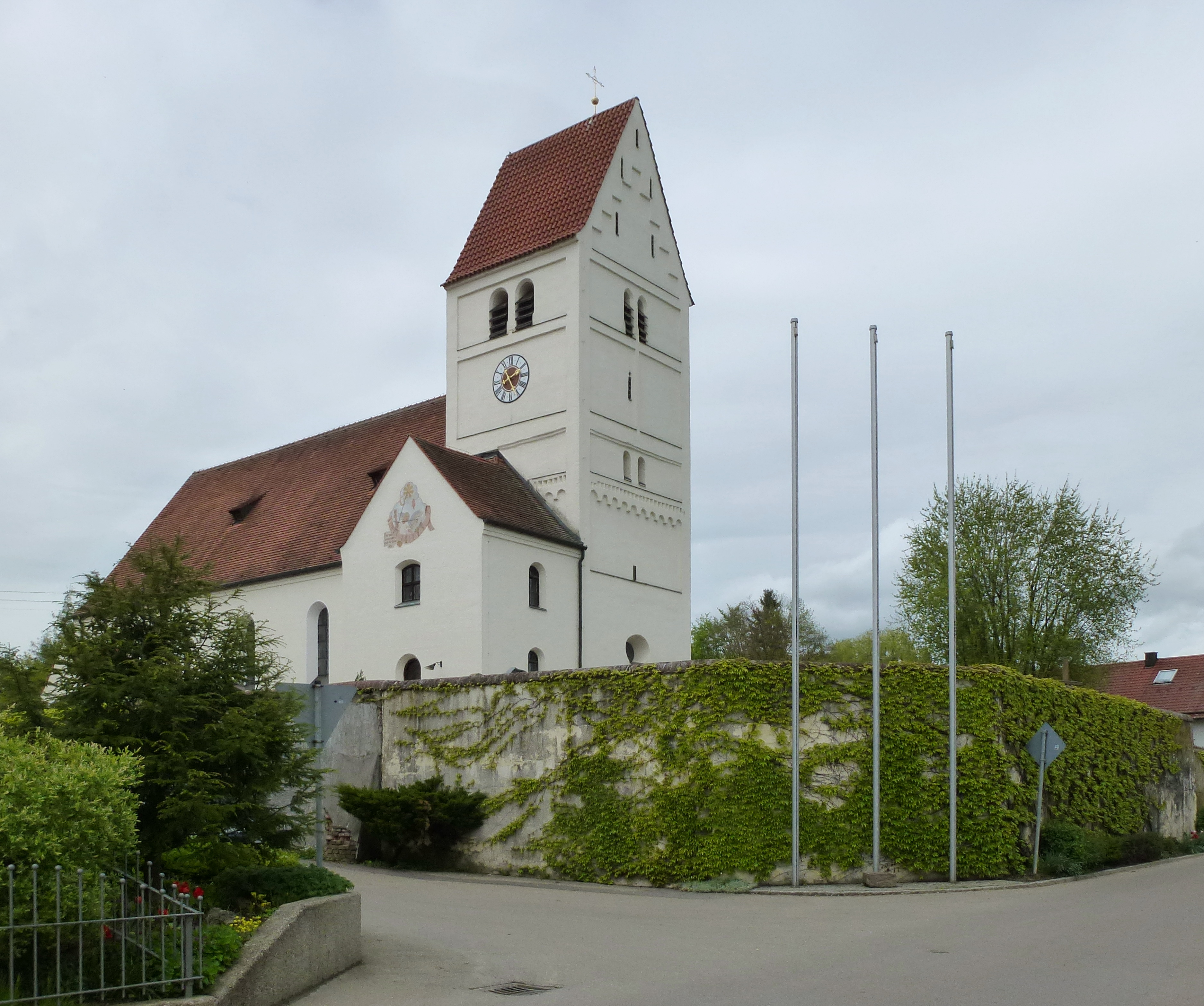 Schwabhausen Kirchenstr. 9: Katholische Pfarrkirche St. Michael. Ansicht von SO. Von der ursprünglichen Kirche stammt nur noch der Turm, alles andere wurde abgerissen und unter Leitung des Architekten Baumgartner (Familiengrab im Friedhof s. Bild 010) ab 1934 (gemäß Epitaph von Pfarrer Andre Lampersberger, s. Bild 008) neu erbaut.